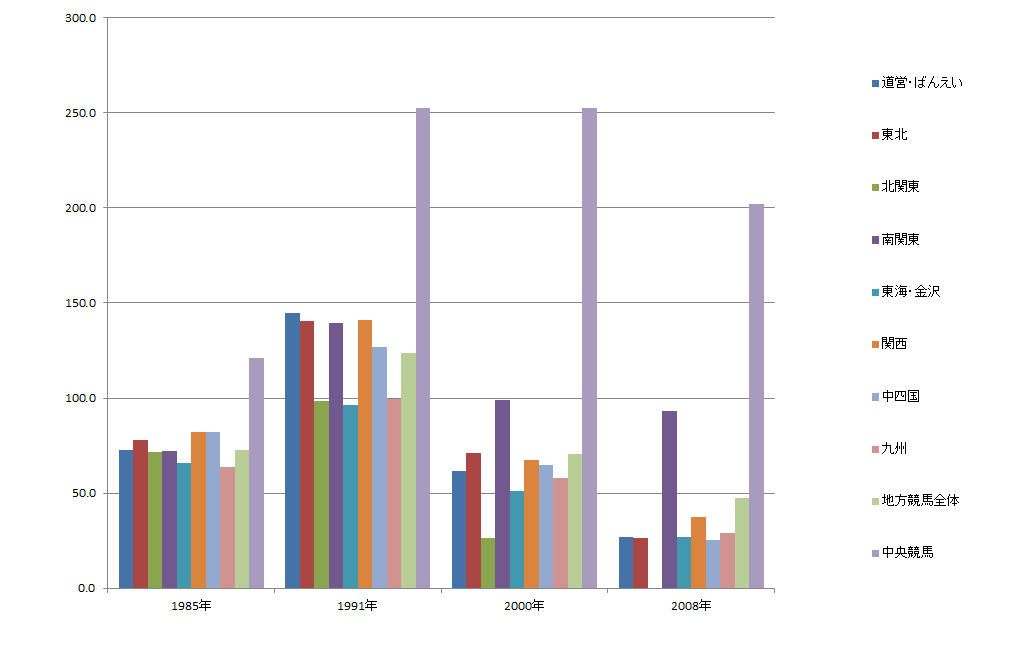 地方競馬と中央競馬の売りあげ推移